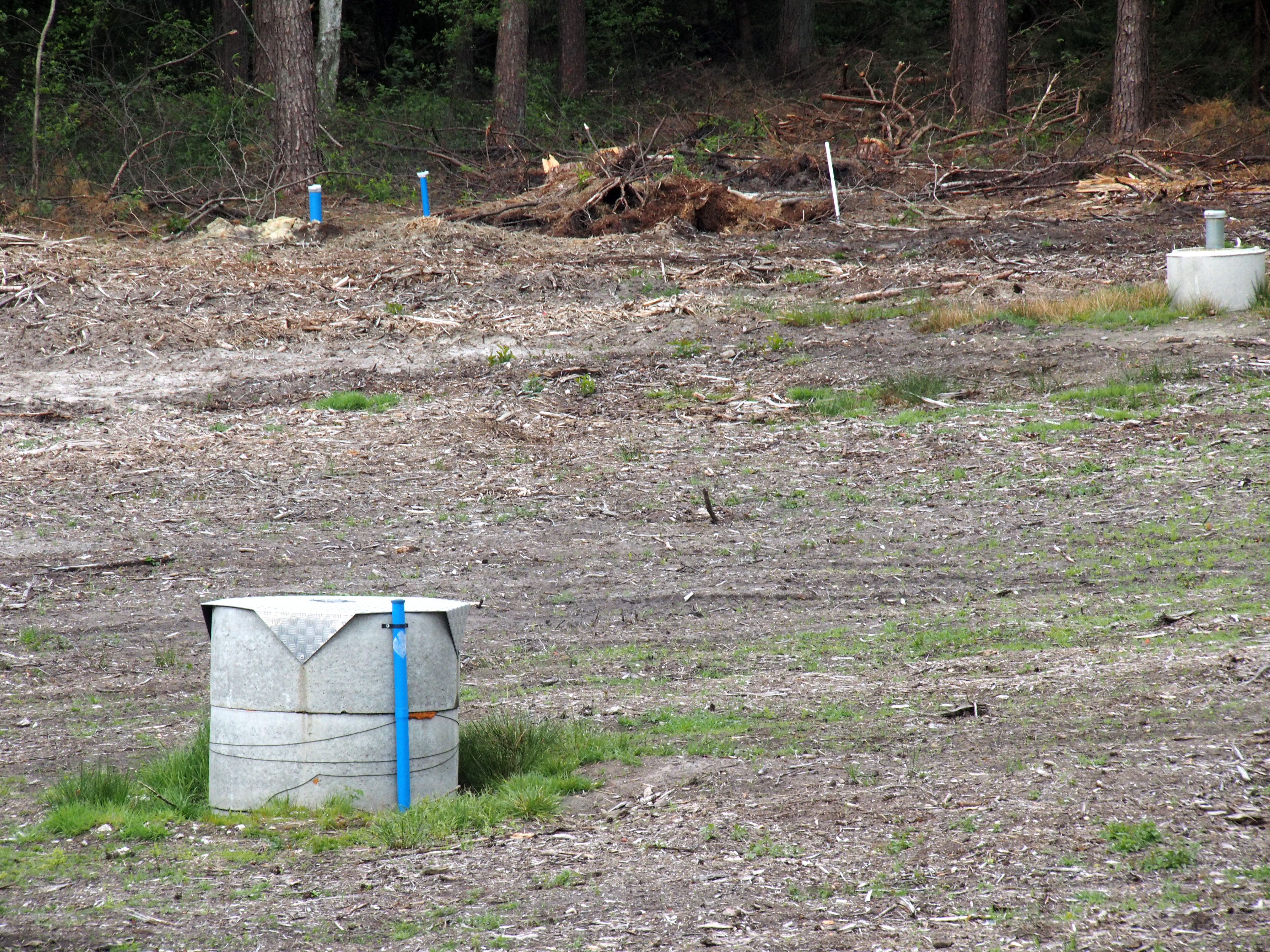 Kontrollbrunnen im Zentralbereich des Dethlinger Teiches – Hier lagern Sprengstoff-Altlasten der ehemaligen Lufthauptmunitionsanstalt 4/XI Oerrel